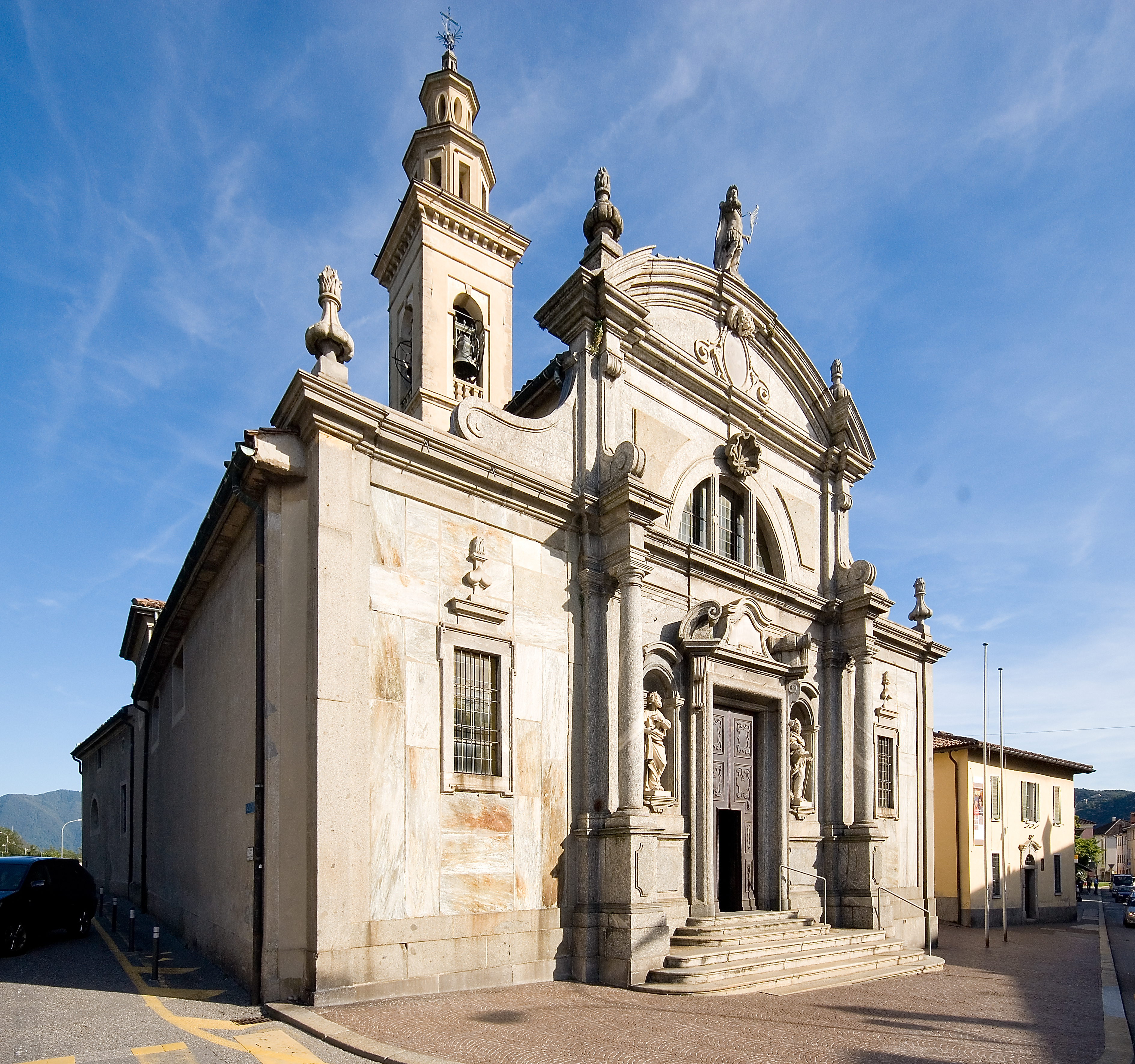 Complesso della collegiata di S. Vittore a Balerna, facciata